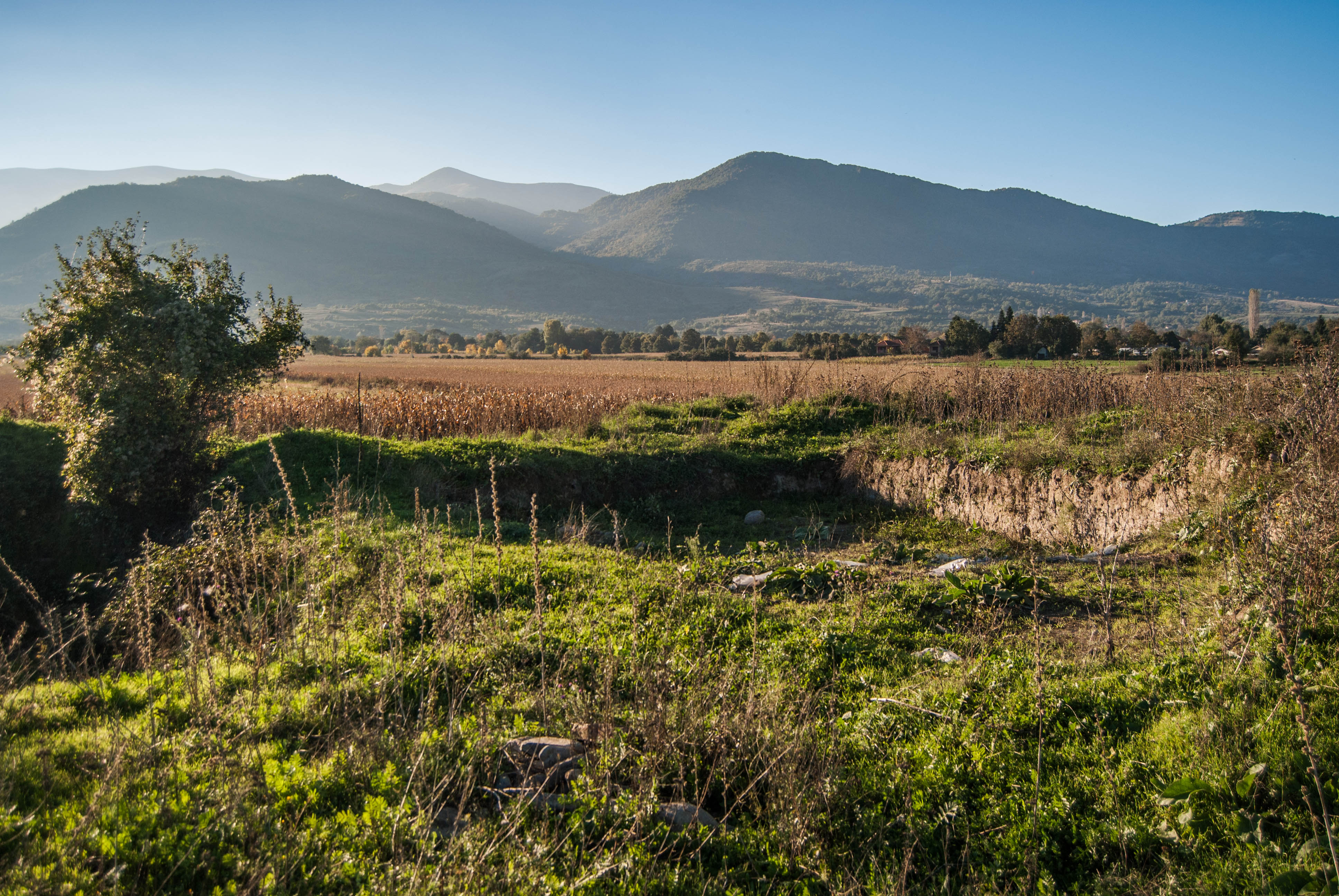 Археолошки ископини во Велушка Тумба — археолошки локалитет во близина на битолското село Велушина. Локалитетот претставува населба од неолитско време.